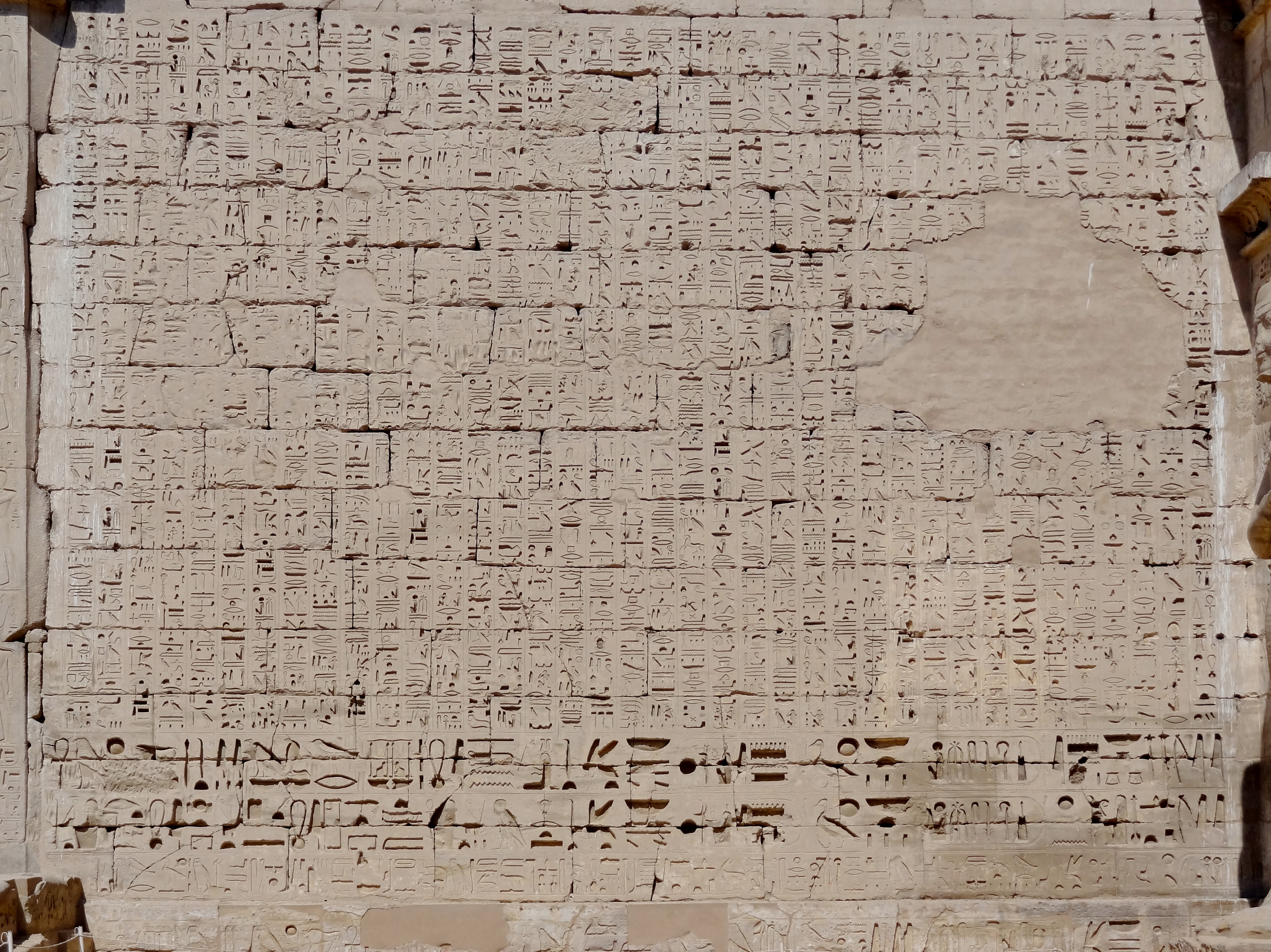 Relief im ersten Innenhof am zweiten Pylon des Totentempels Ramses’ III. in Medinet Habu, Ägypten